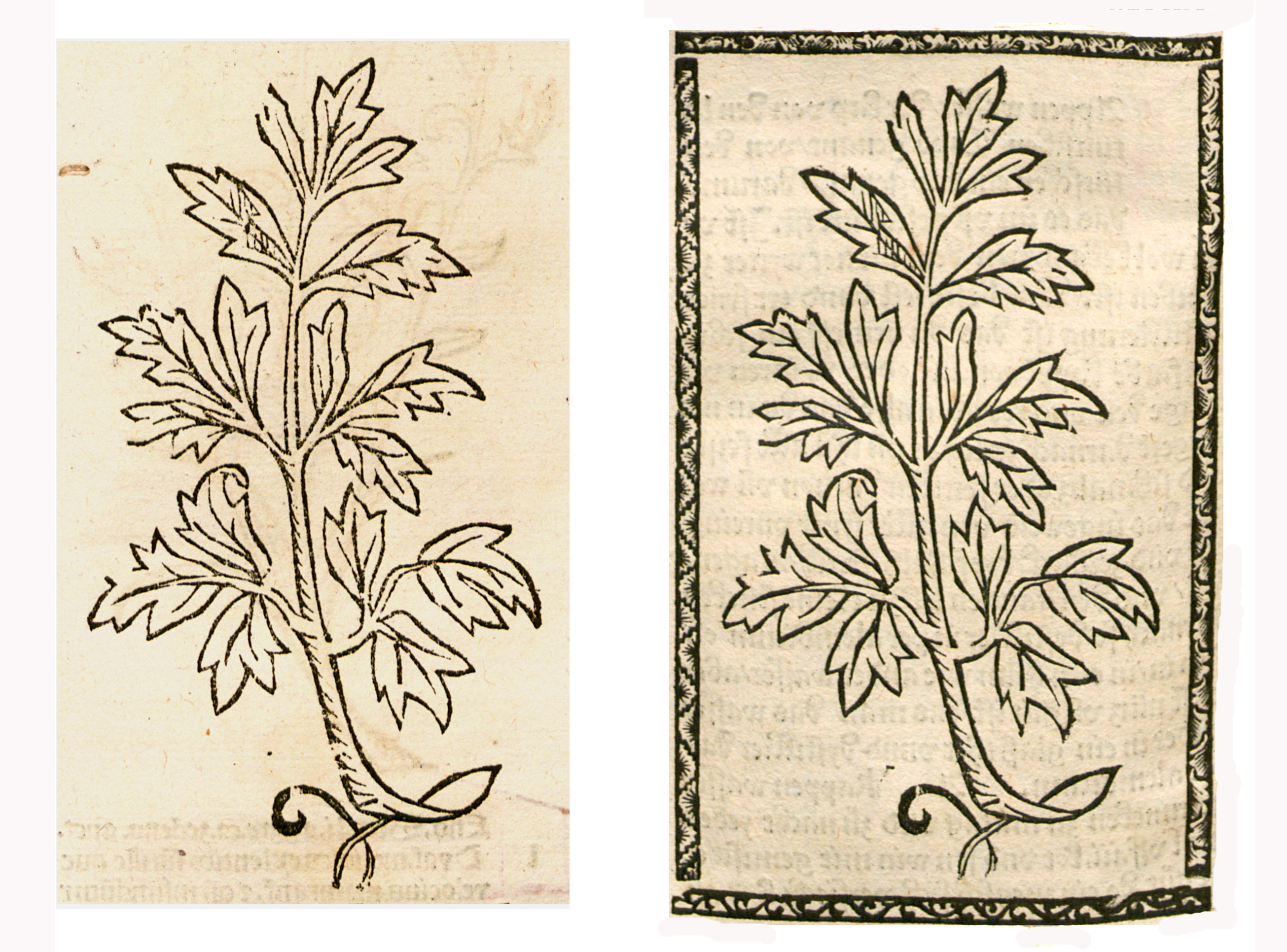 Abbildung von: Lieb Stickel (Levisticum officinale)